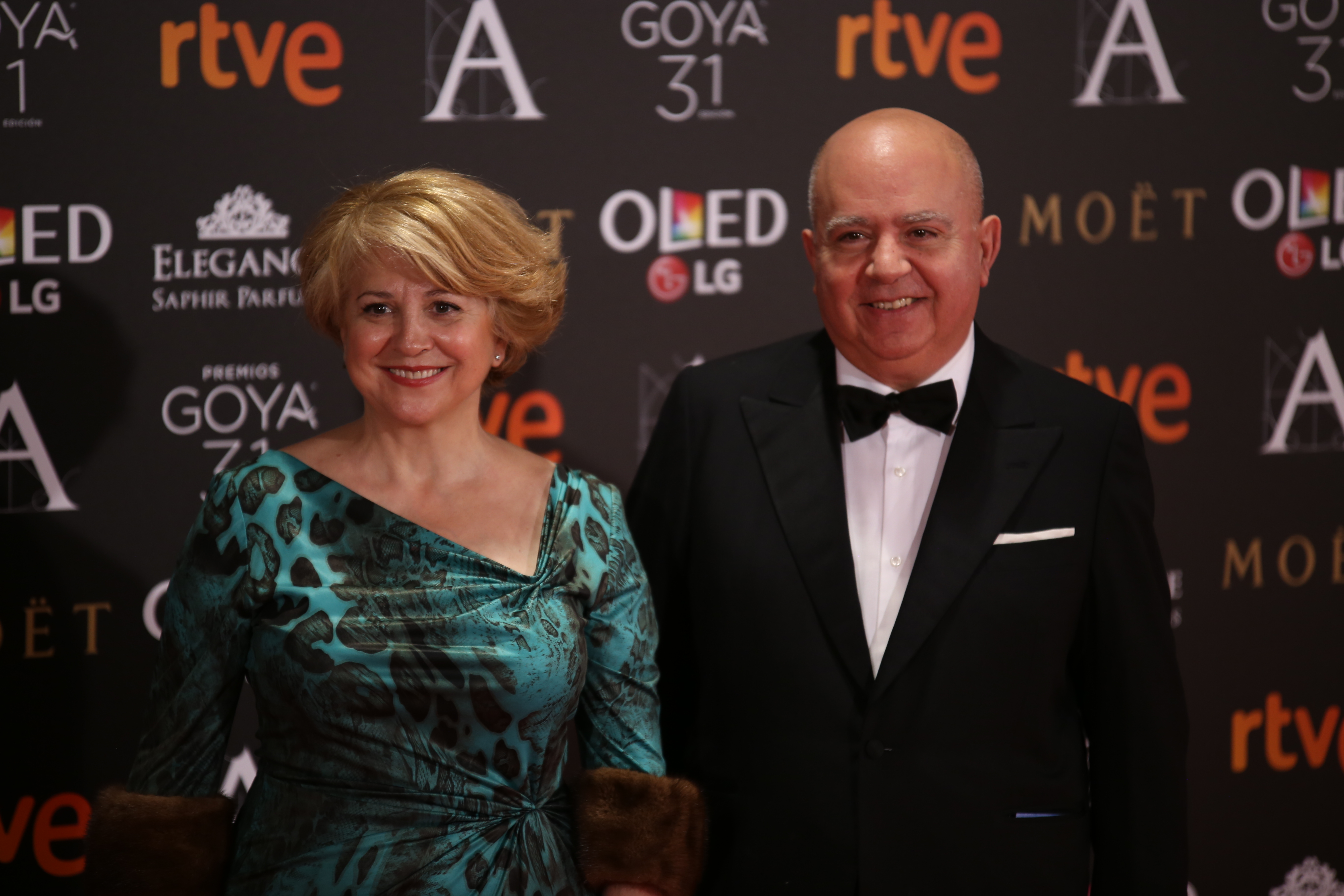 Premios Goya 2017